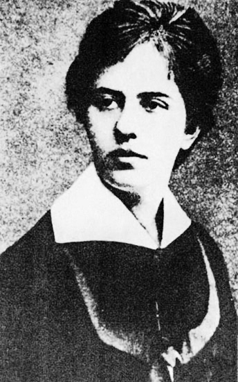 Dr. Draga Ljocic-Milosevic